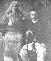 Serbian Chetnik Doksim Mihailović